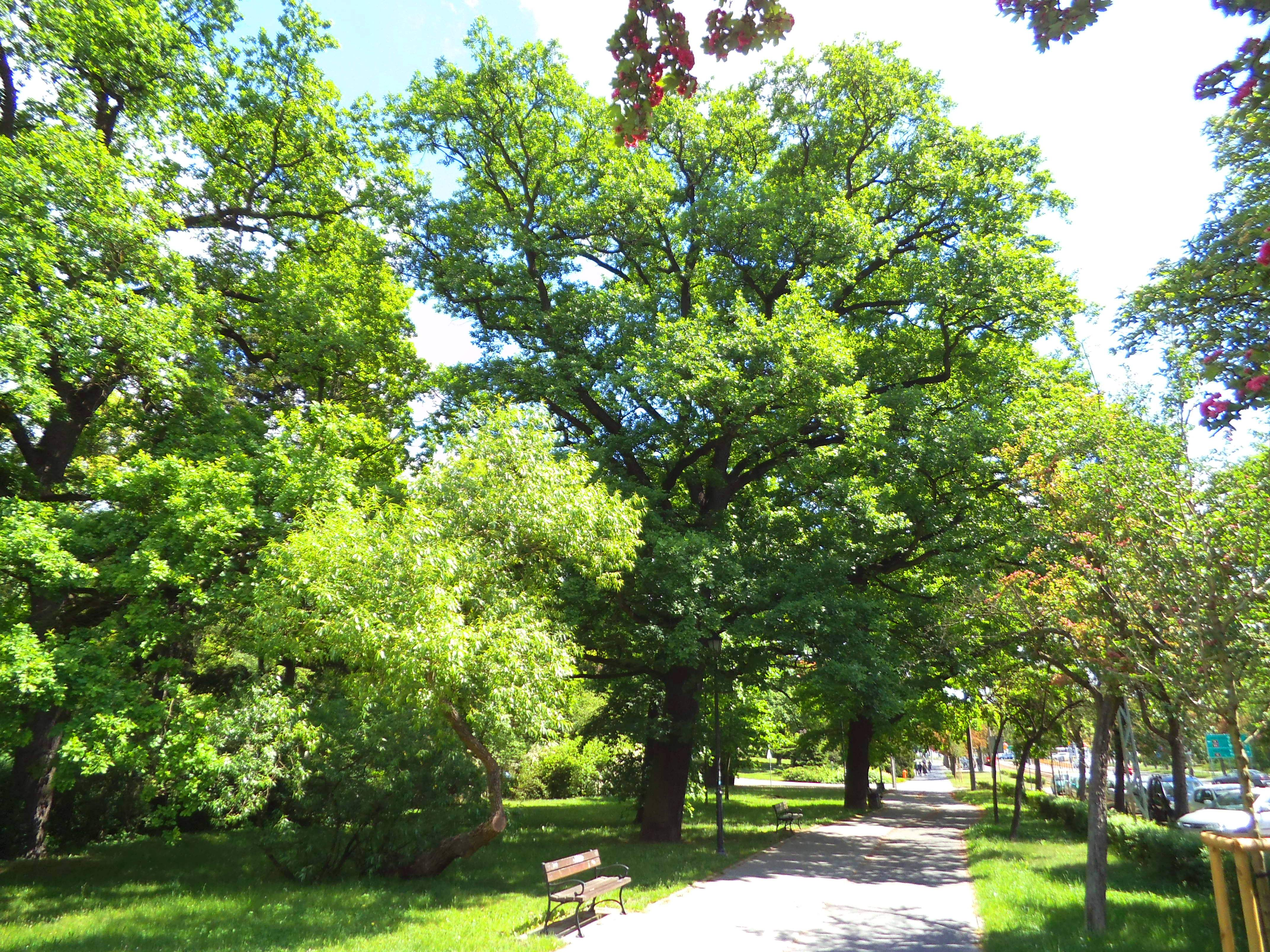 ul Chopina w Toruniu, lato